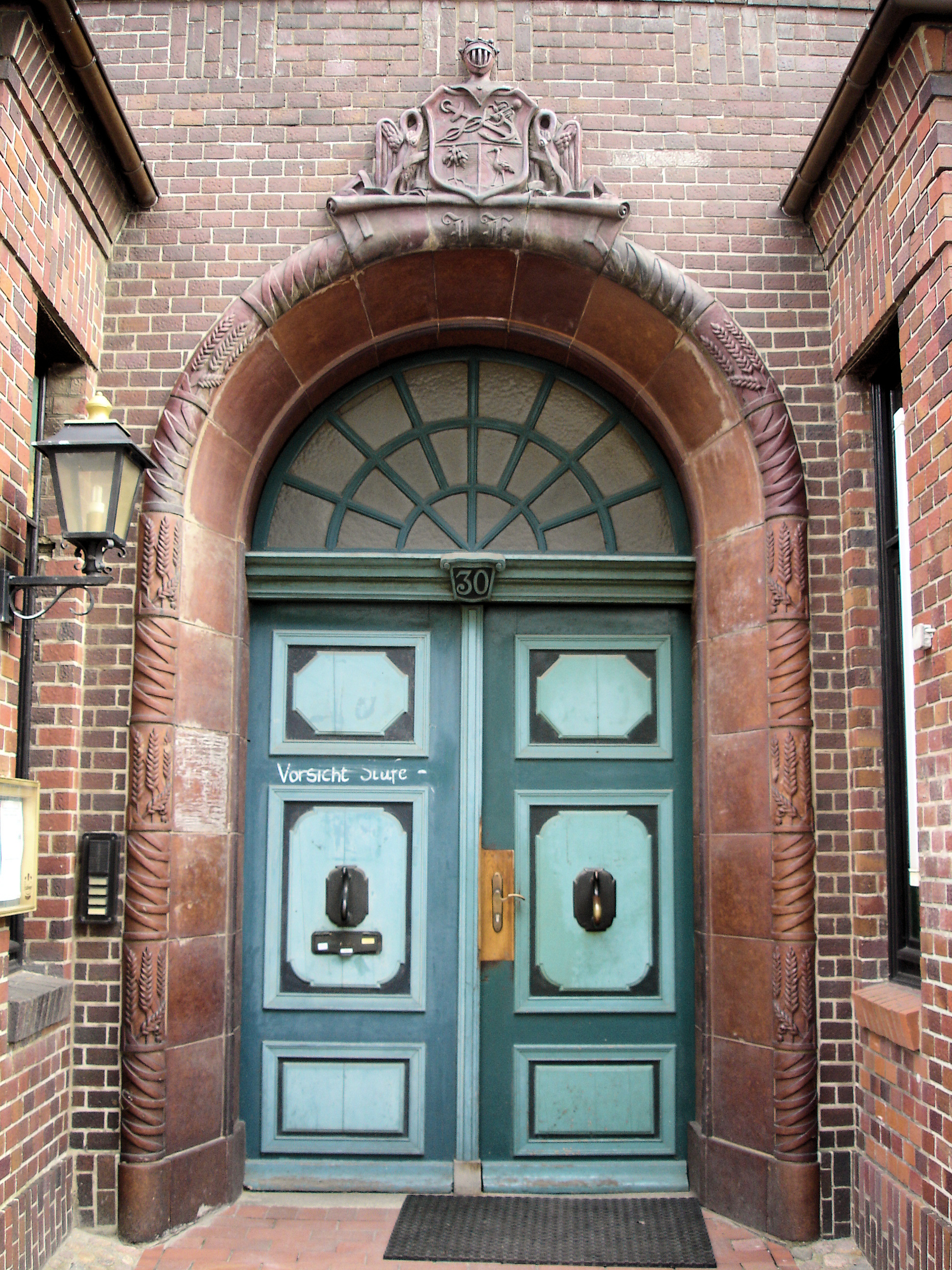 Portal mit Wappen, Große Wasserstraße Rostock von Margarete Scheel um 1938